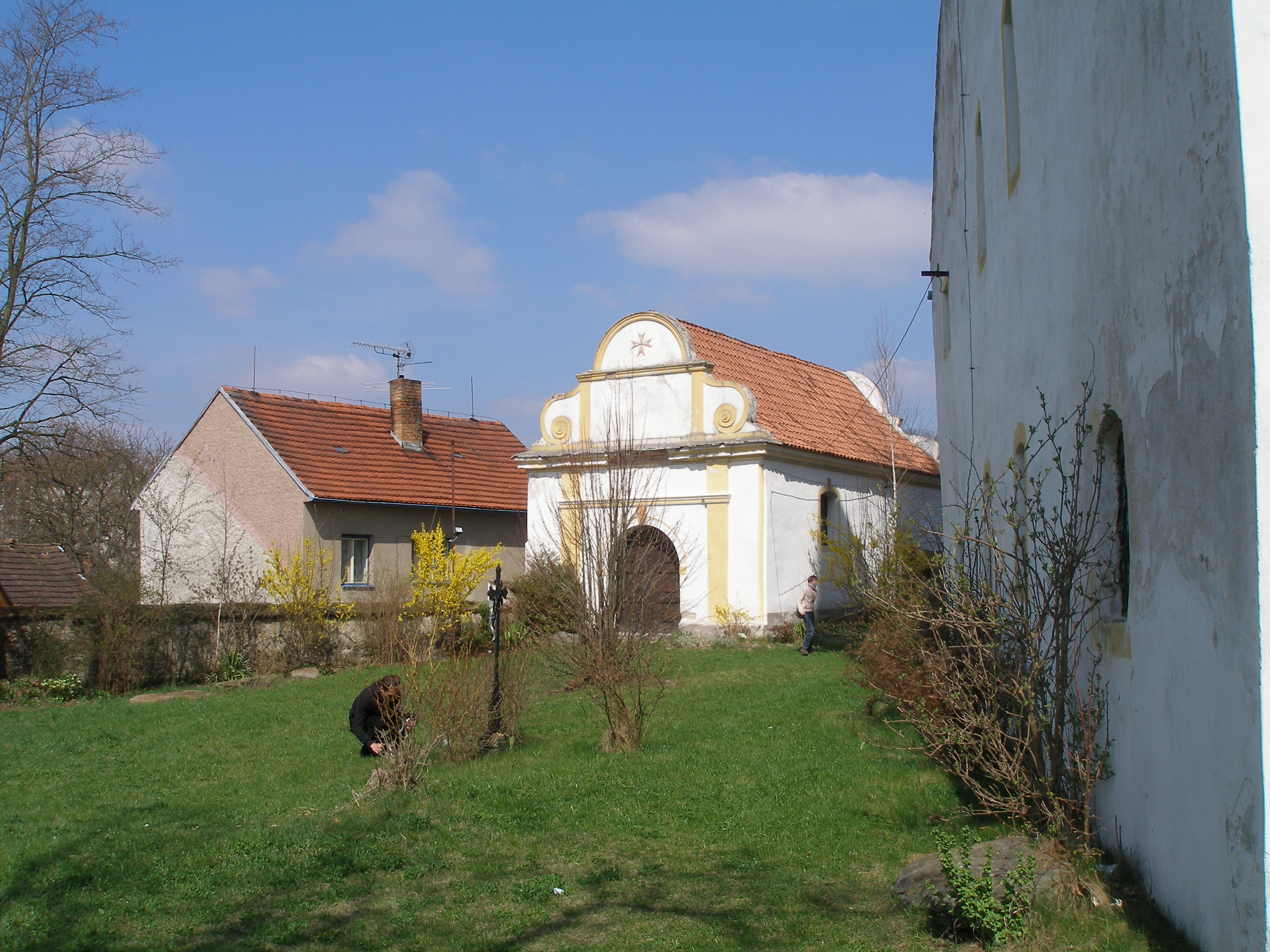 Kostnice na starém hřbitově, Radomyšl